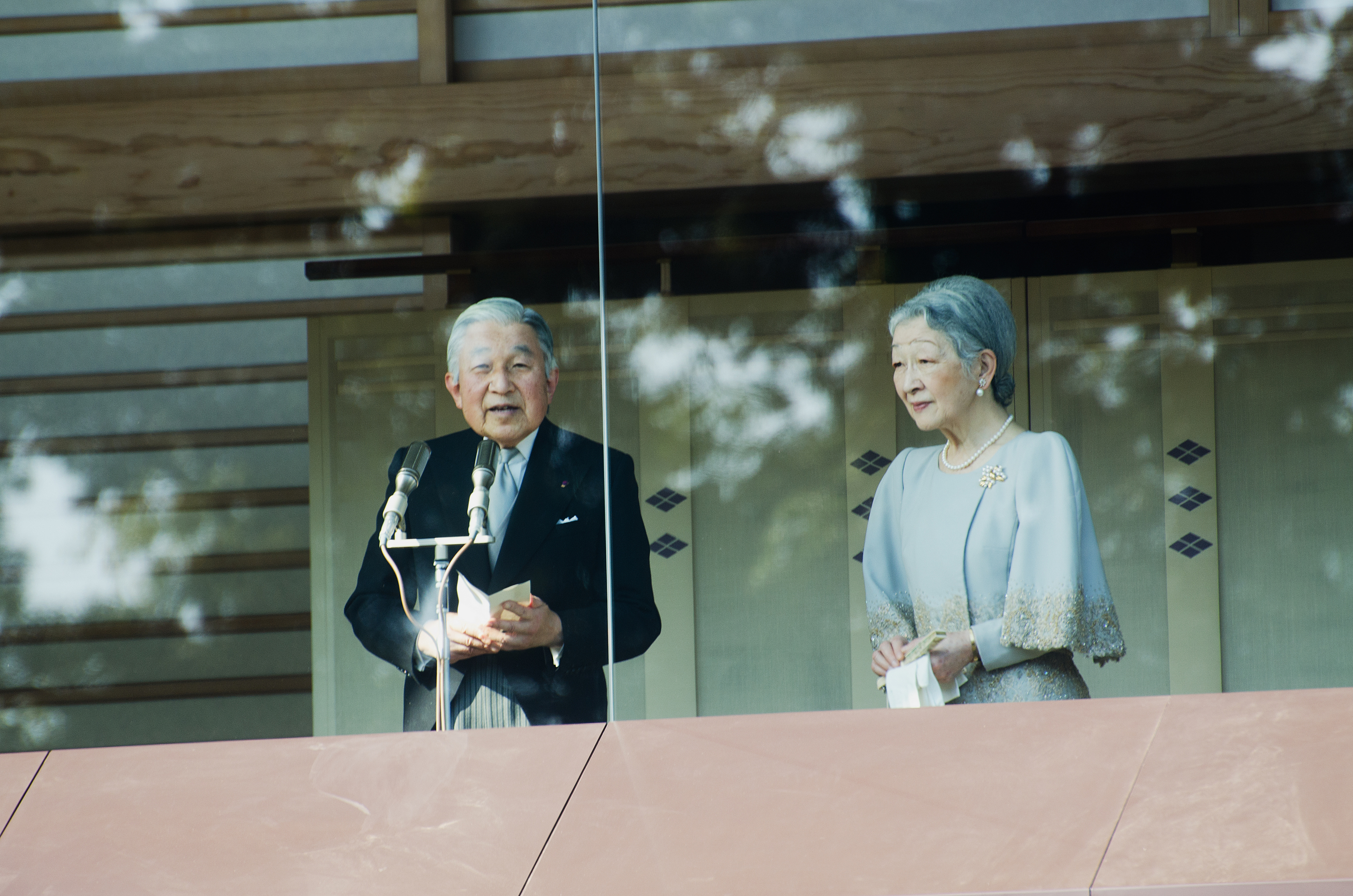 日本天皇明仁與皇后美智子。